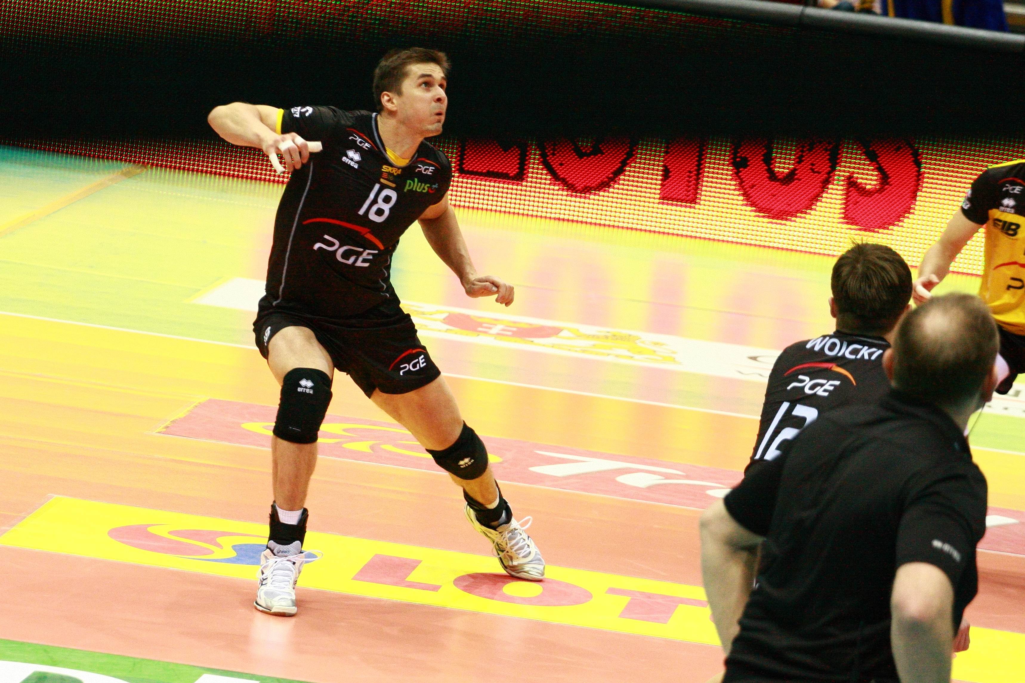 Lotos Trefl Gdańsk vs Skra Bełchatów